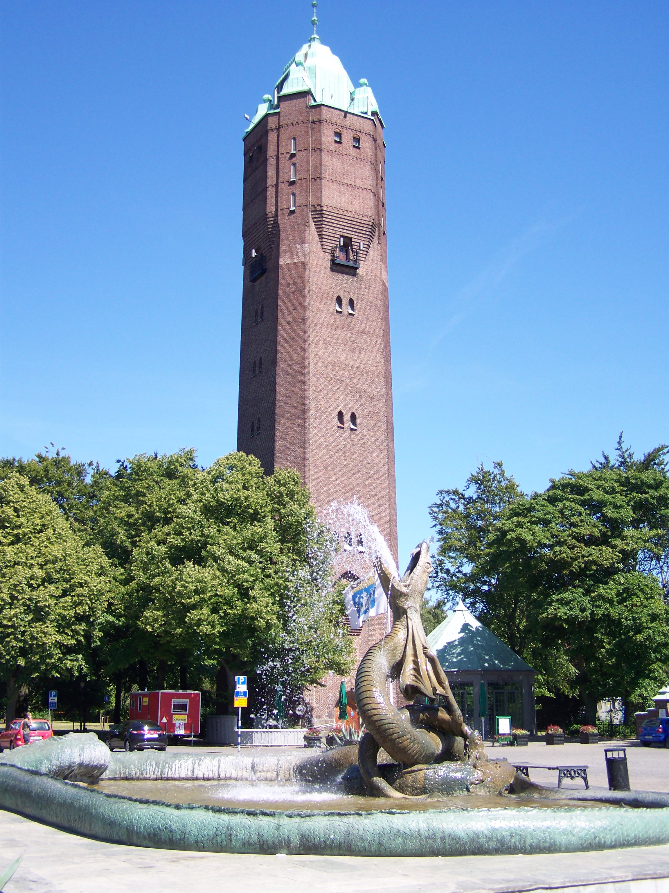 Trelleborg, Seeschlangen-Springbrunnen ("Sjöormsfontanen", 1935) und Turm